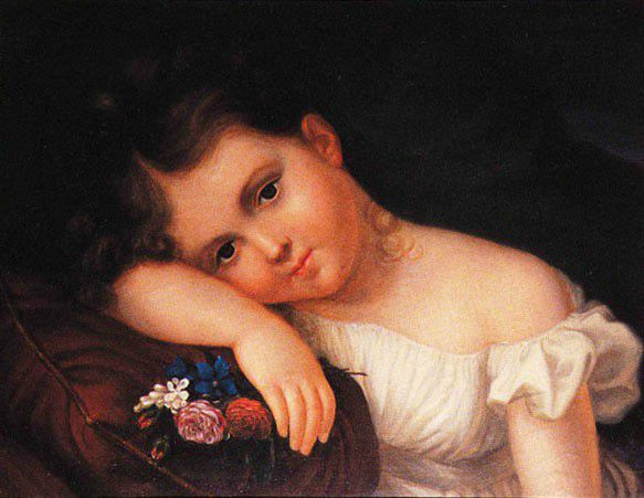 Elisa de Lamartine (1790-1863), Portrait de Marie Louise Julie de Lamartine, dite Julia, fille d'Alphonse et Elisa Lamartine. Huile sur toile, Saint-Point, château de Saint-Point.